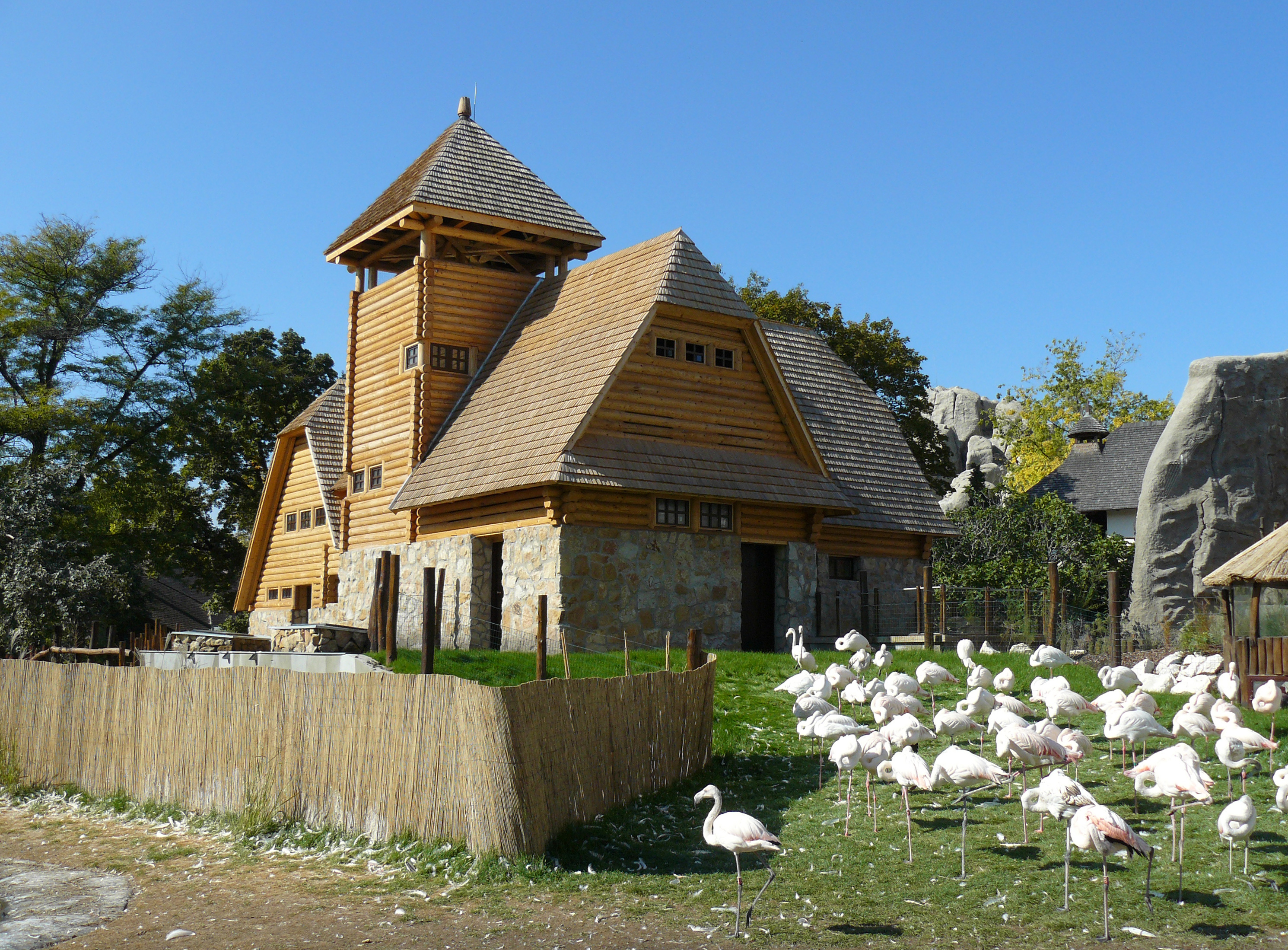 A 2010 szeptemberében átadott, átépített Bölényház a Fővárosi Állatkertben (Budapest)